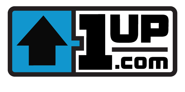 Logo des Onlinemagazins